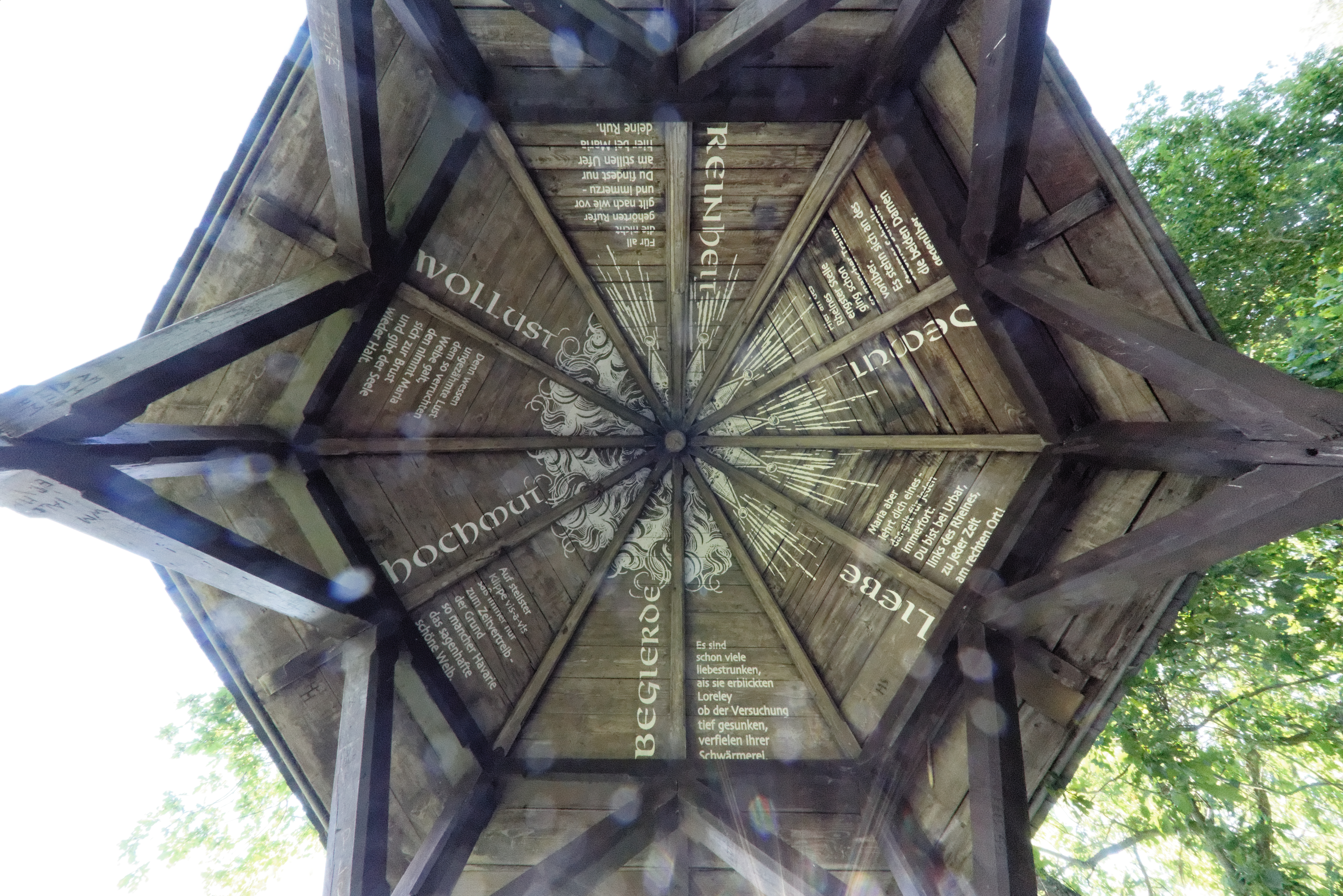 Loreleyblick Maria Ruh Deckeninschrift des Aussichtsturms